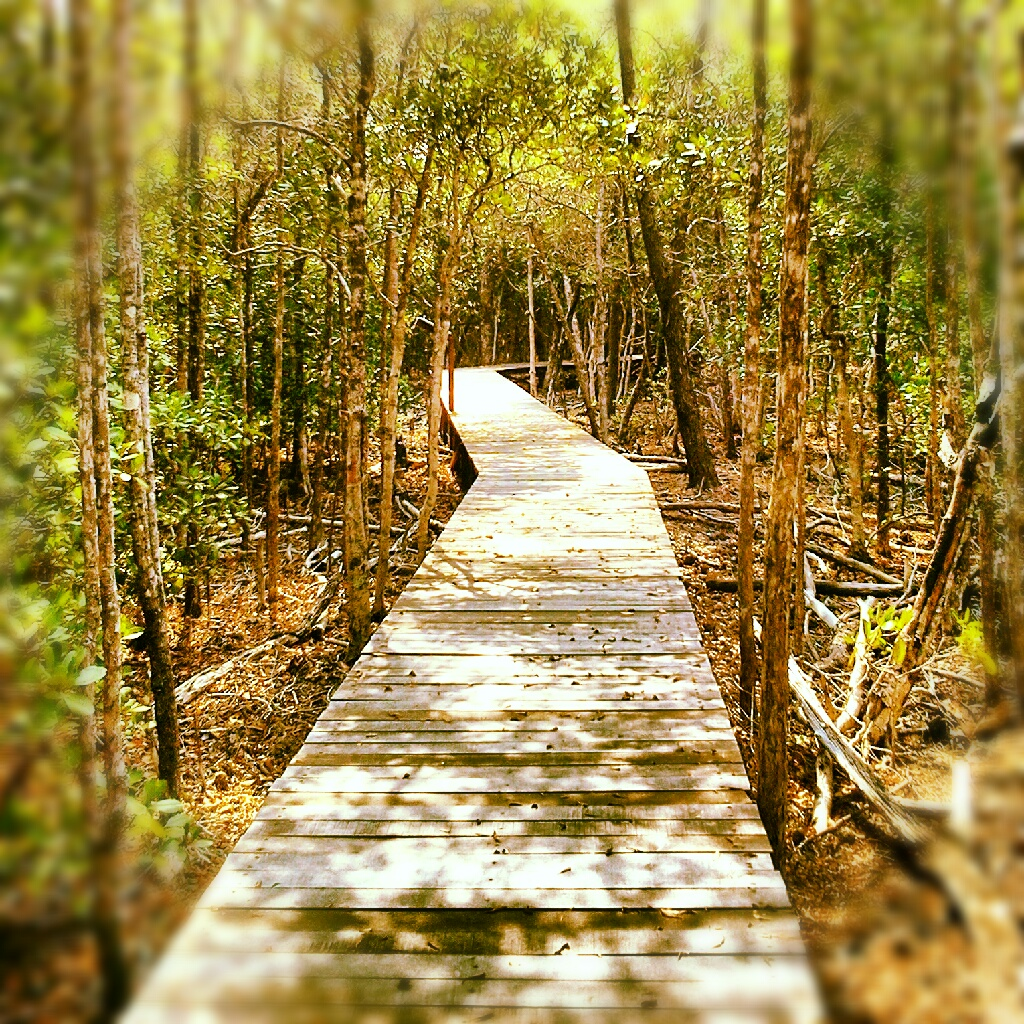 Indonesia merupakan negara kepulauan terbesar. Dan di bagi dalam beberapa provinsi. Ini merupakan salah satu keindahan kepulauan di indonesia. Kepulauan kecil karimun jawa di provinsi jawa tengah.